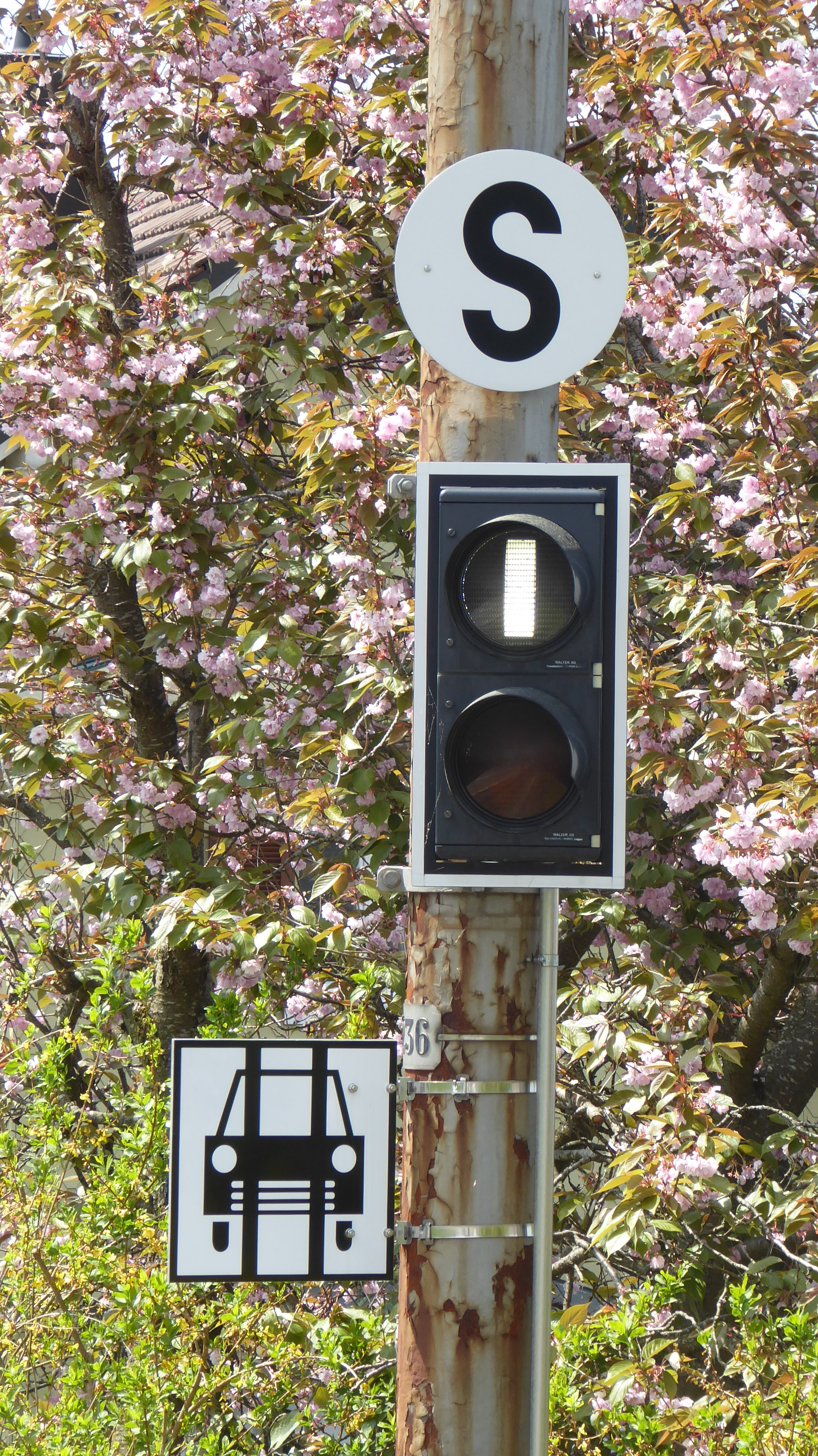 Einfahrsignal der Appenzeller Bahnen in Vögelinsegg Richtung St. Gallen